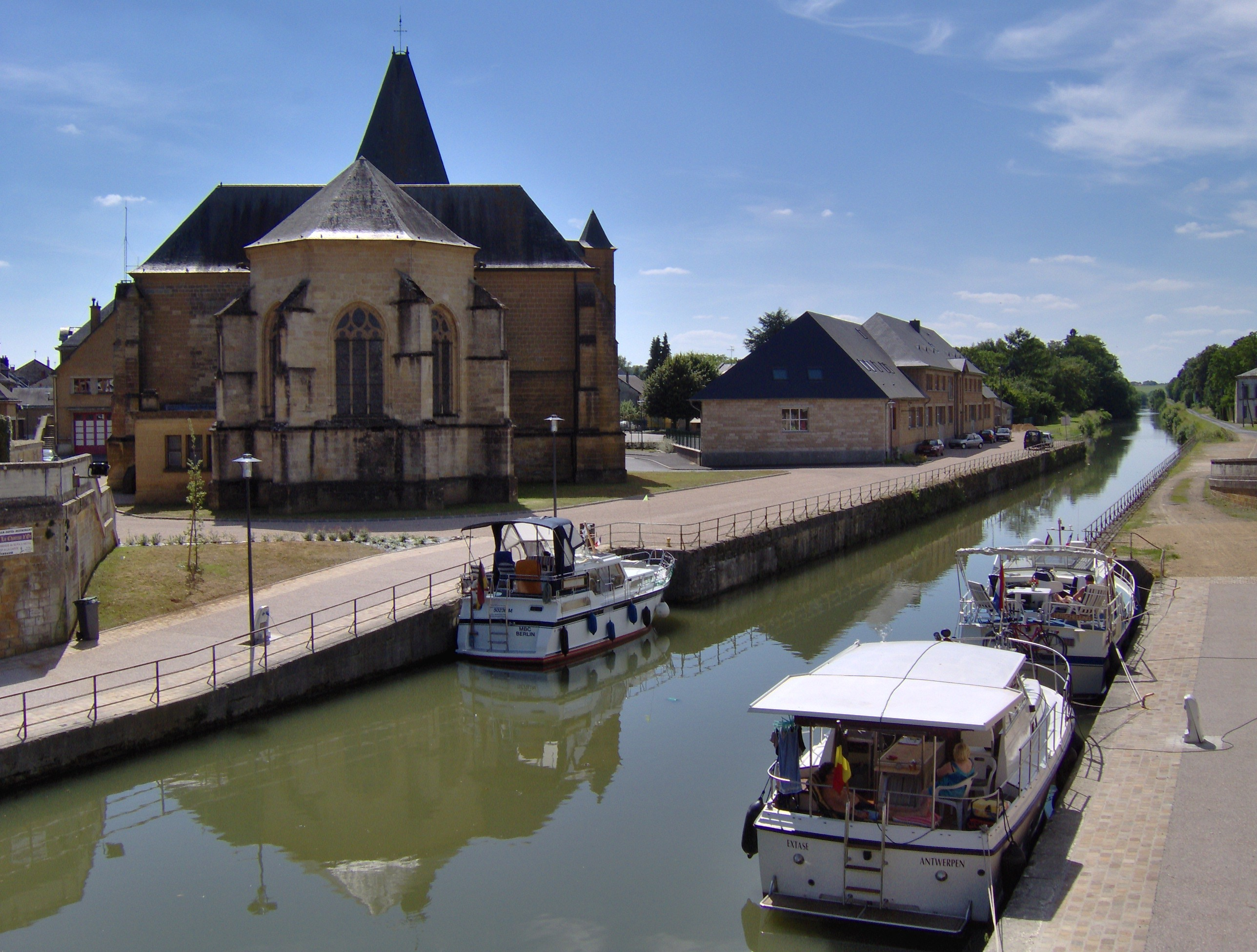 Eglise et canal, commune du Chesne, Ardennes, France